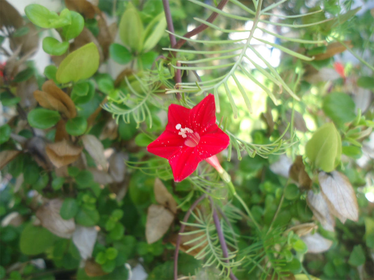 Ipomoea quamoclit-Esqueleto